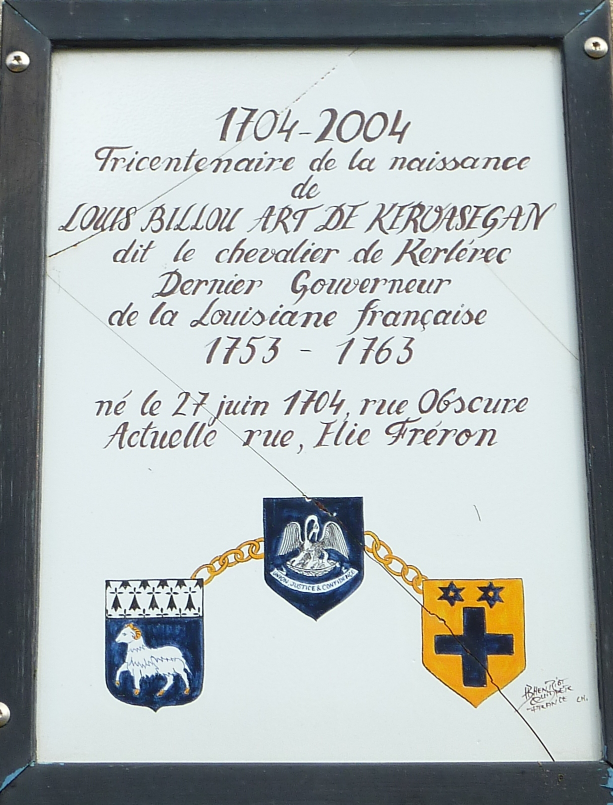 Quimper : plaque commémorative de Louis Billouart de Kerlérec (Louis Billouart de Kervazegan, dit aussi chevalier de Kerlérec), né à Quimper en 1704 et dernier gouverneur de la Louisiane française entre 1753 et 1763